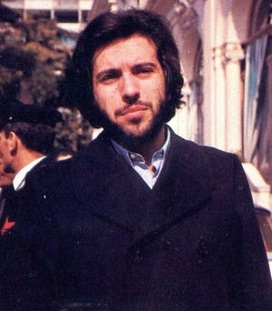 photo from Panini Cantanti '72 (1972)